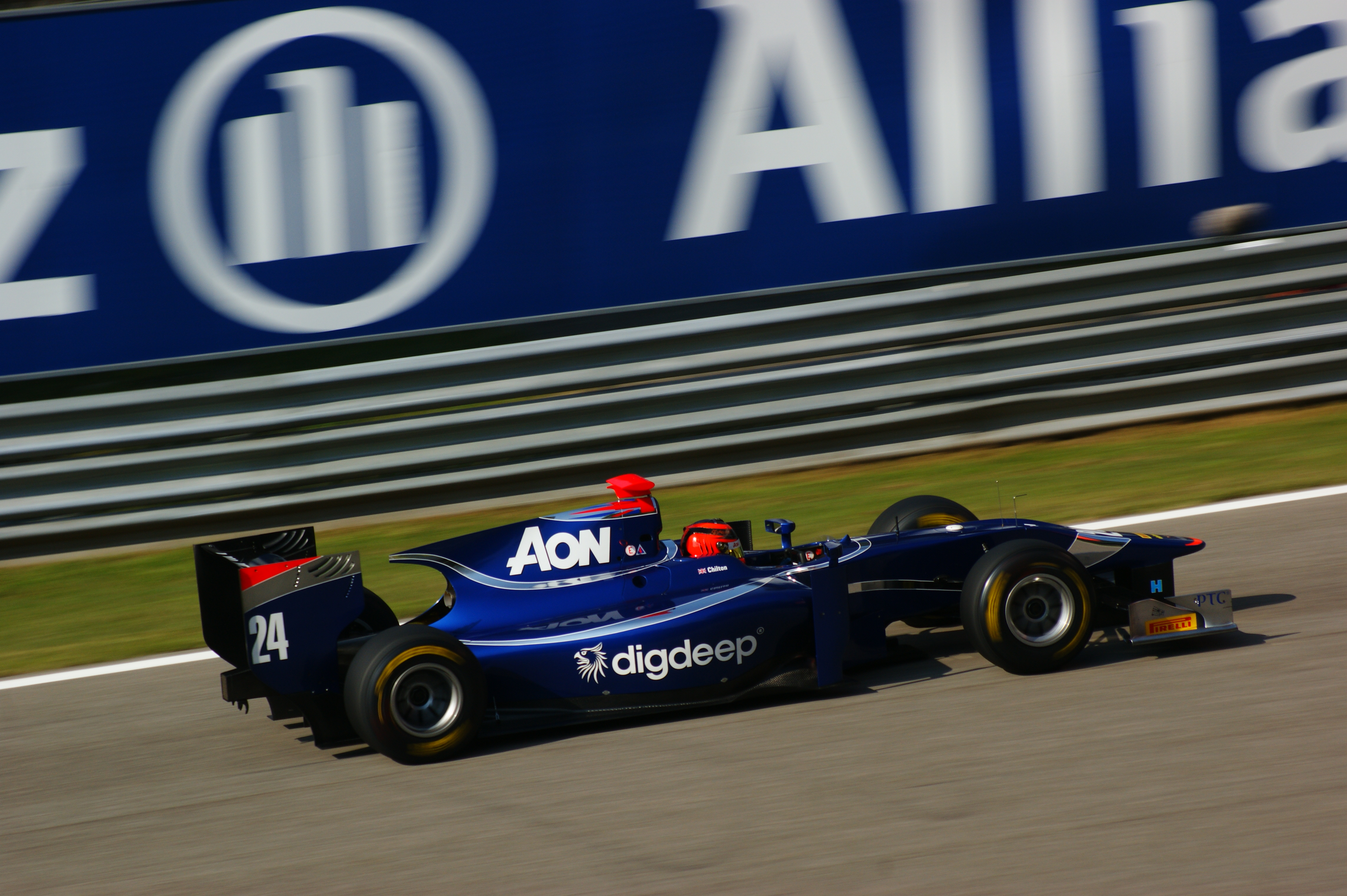 Max Chilton alla variante della roggia Monza 2011